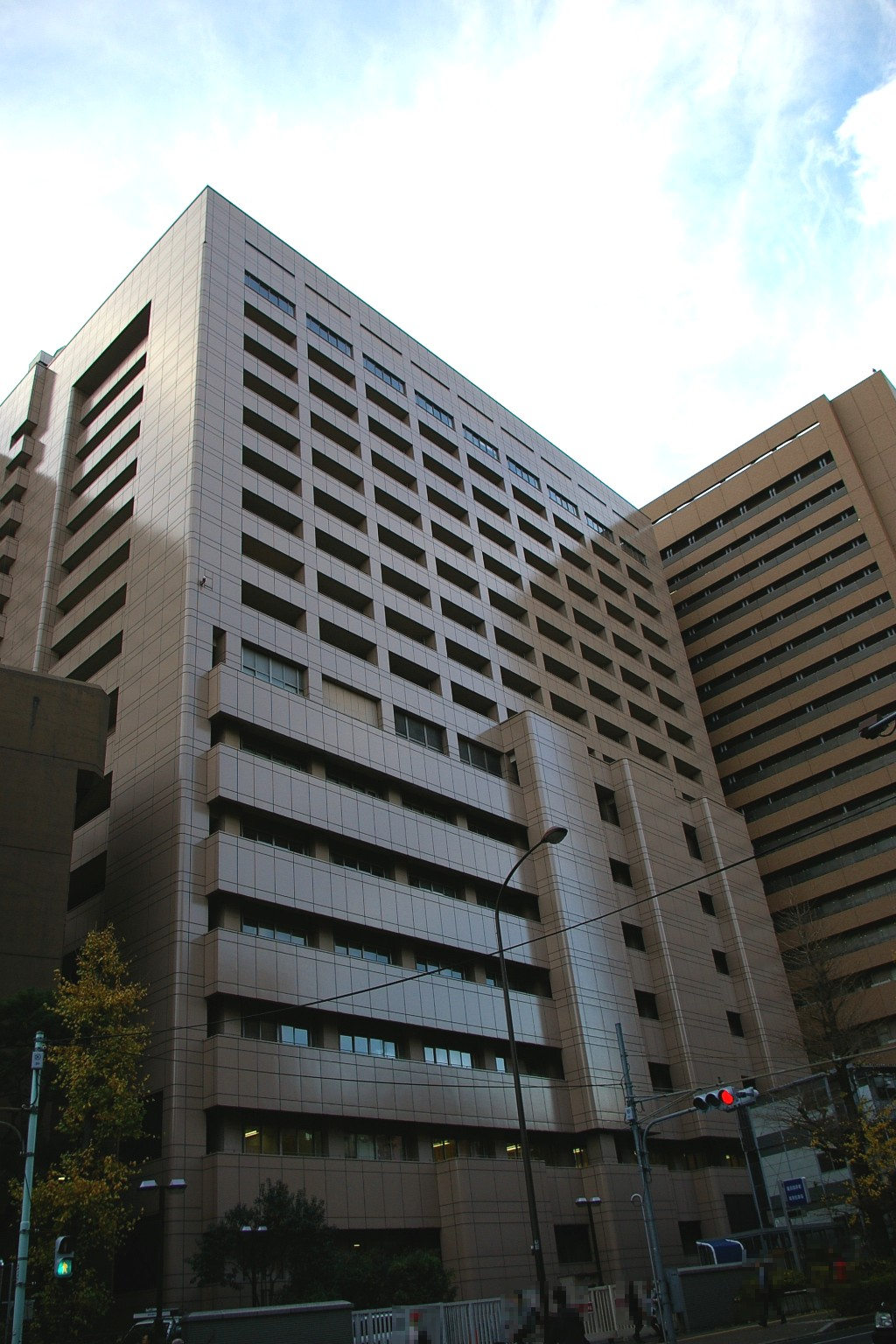 東京